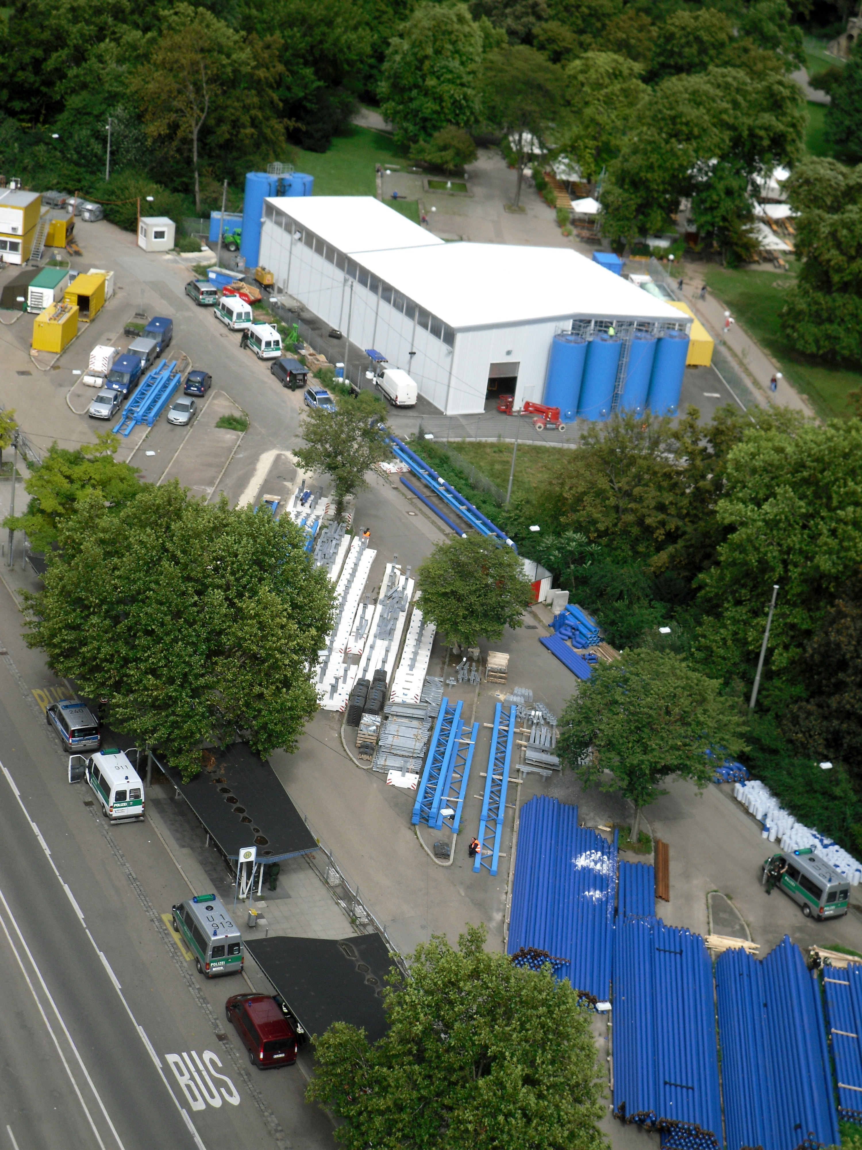 Das "Grundwassermanagement" und gelagerte Baumaterialien (Rohre u.a.) zwischen Stuttgarter Hauptbahnhof und Schloßgarten, fotografiert vom Bahnhofsturm.